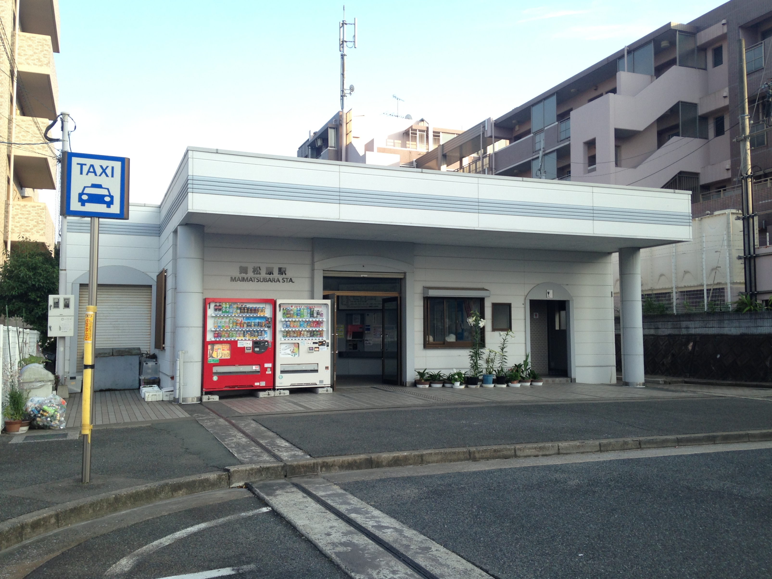 舞松原駅駅舎